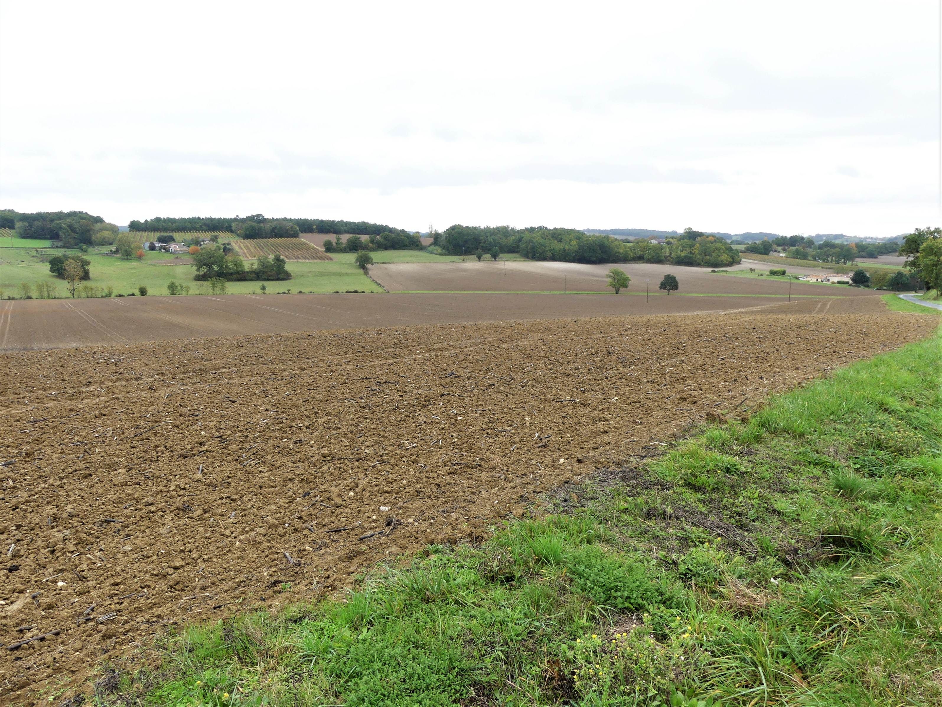 Le vallon de l'Escalette au nord-ouest du lieu-dit Peynau, Sainte-Eulalie-d'Eymet, Dordogne, France.